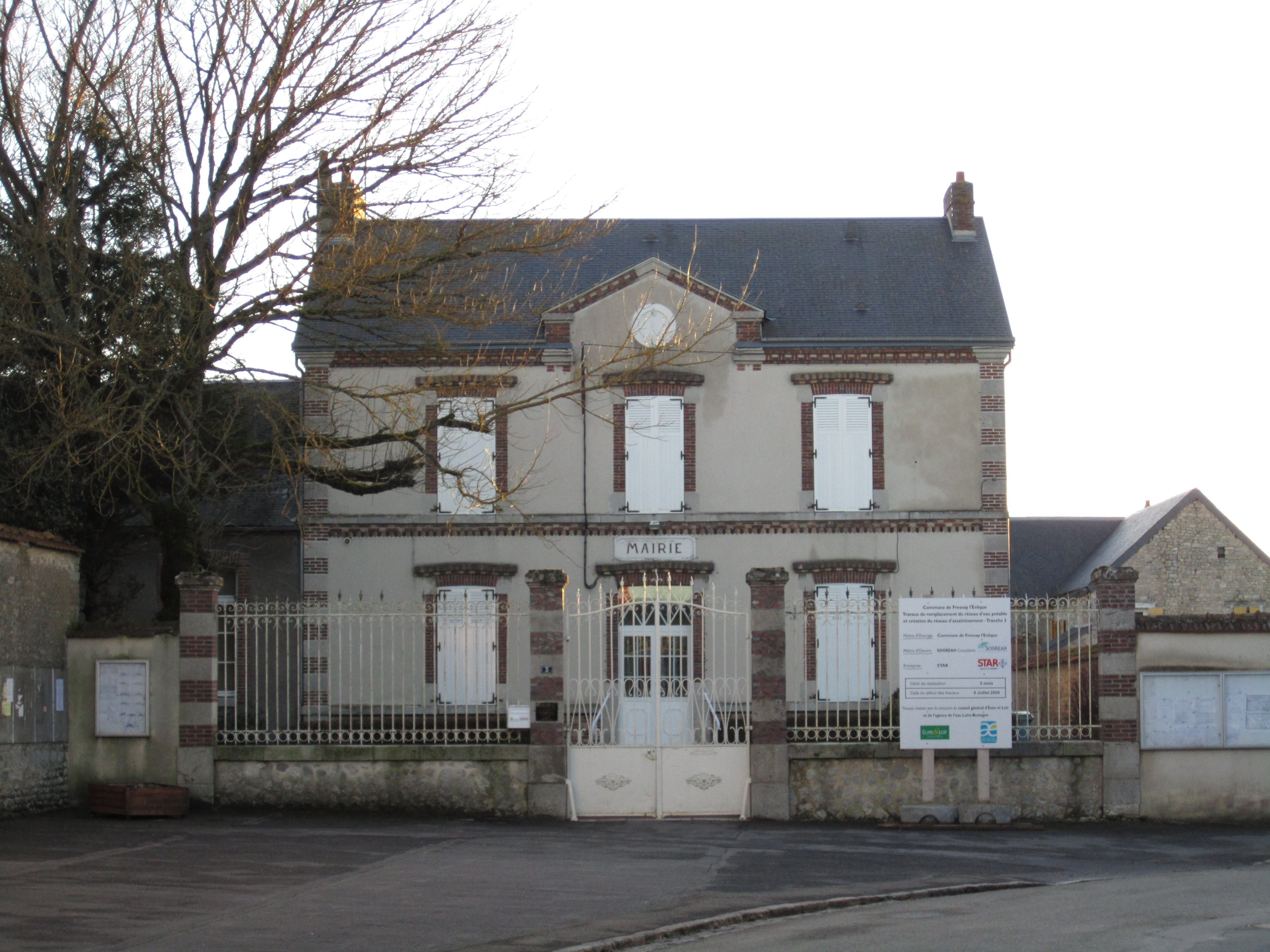 Mairie